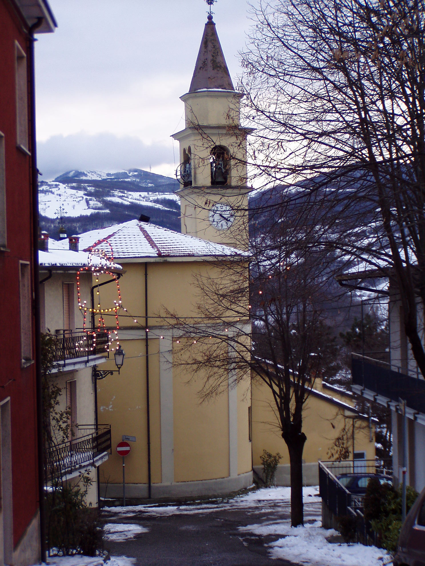 Pecorara, provincia di Piacenza: vista invernale dell'abside della chiesa parrocchiale di San Giorgio.